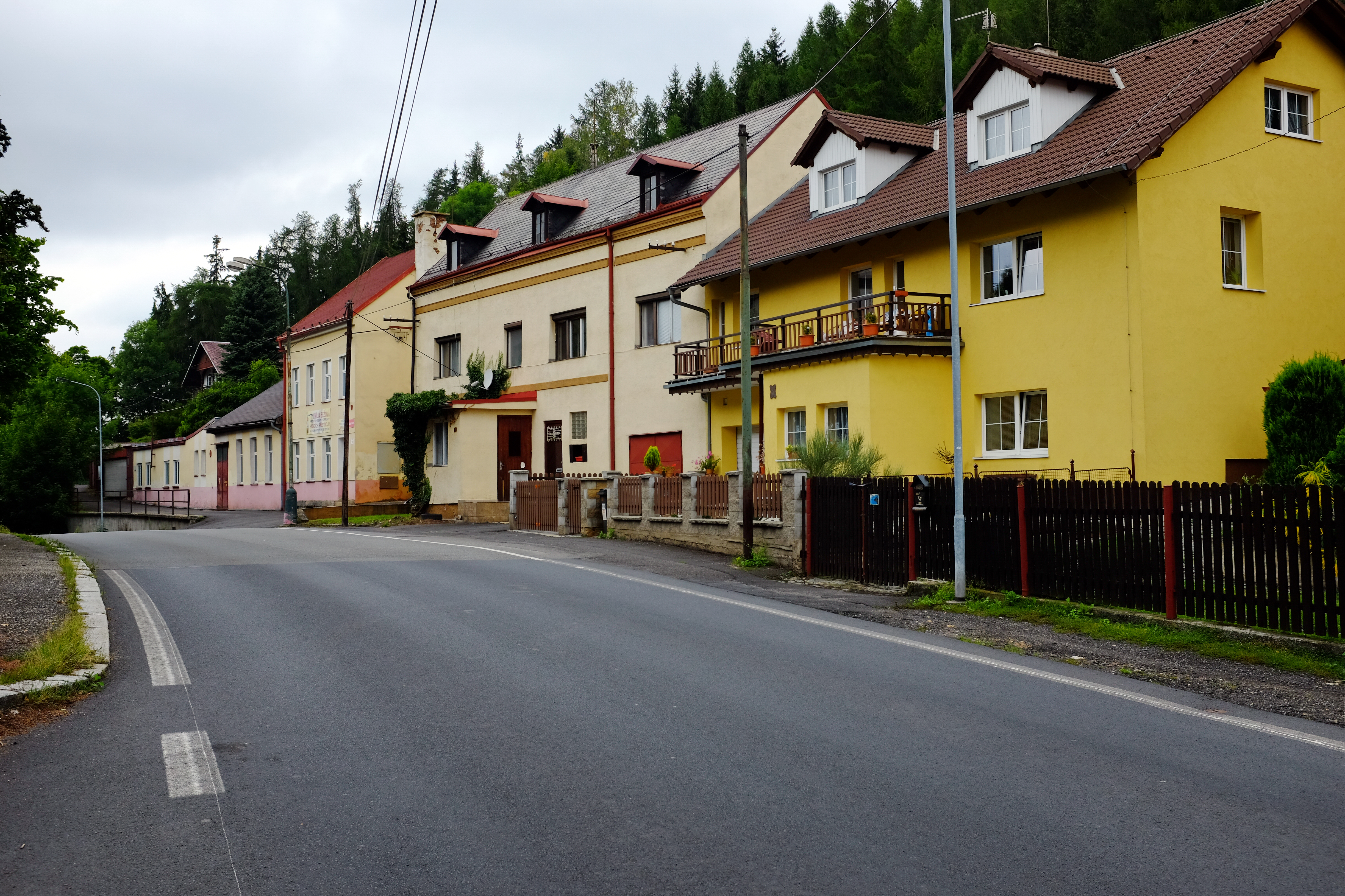 Hůrky, část města Karlovy Vary